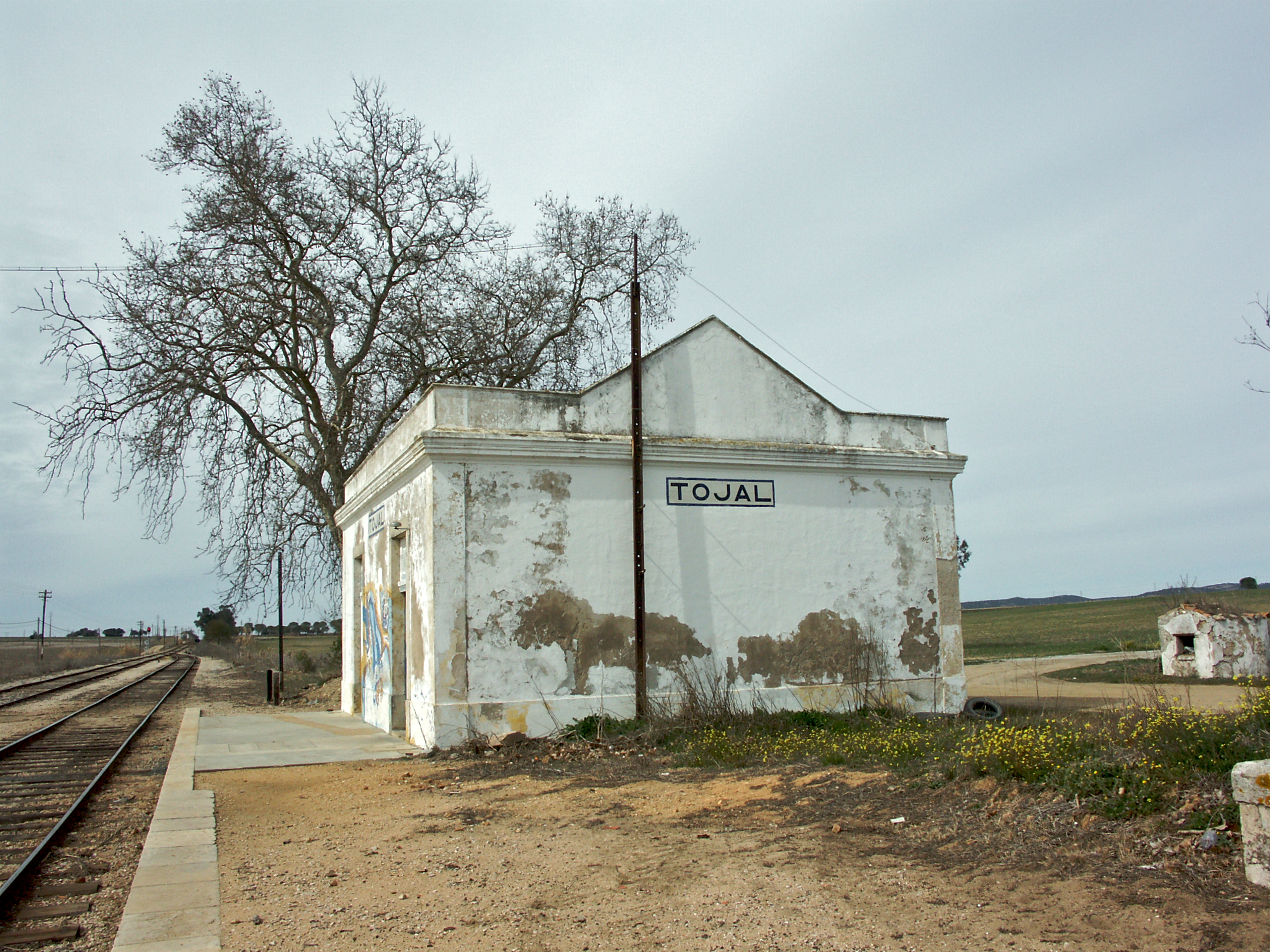 Tipo: E [Estação] Local: Tojal [Linha de Évora, PK 102] Data e hora: 3 de Março de 2005 [13h06]